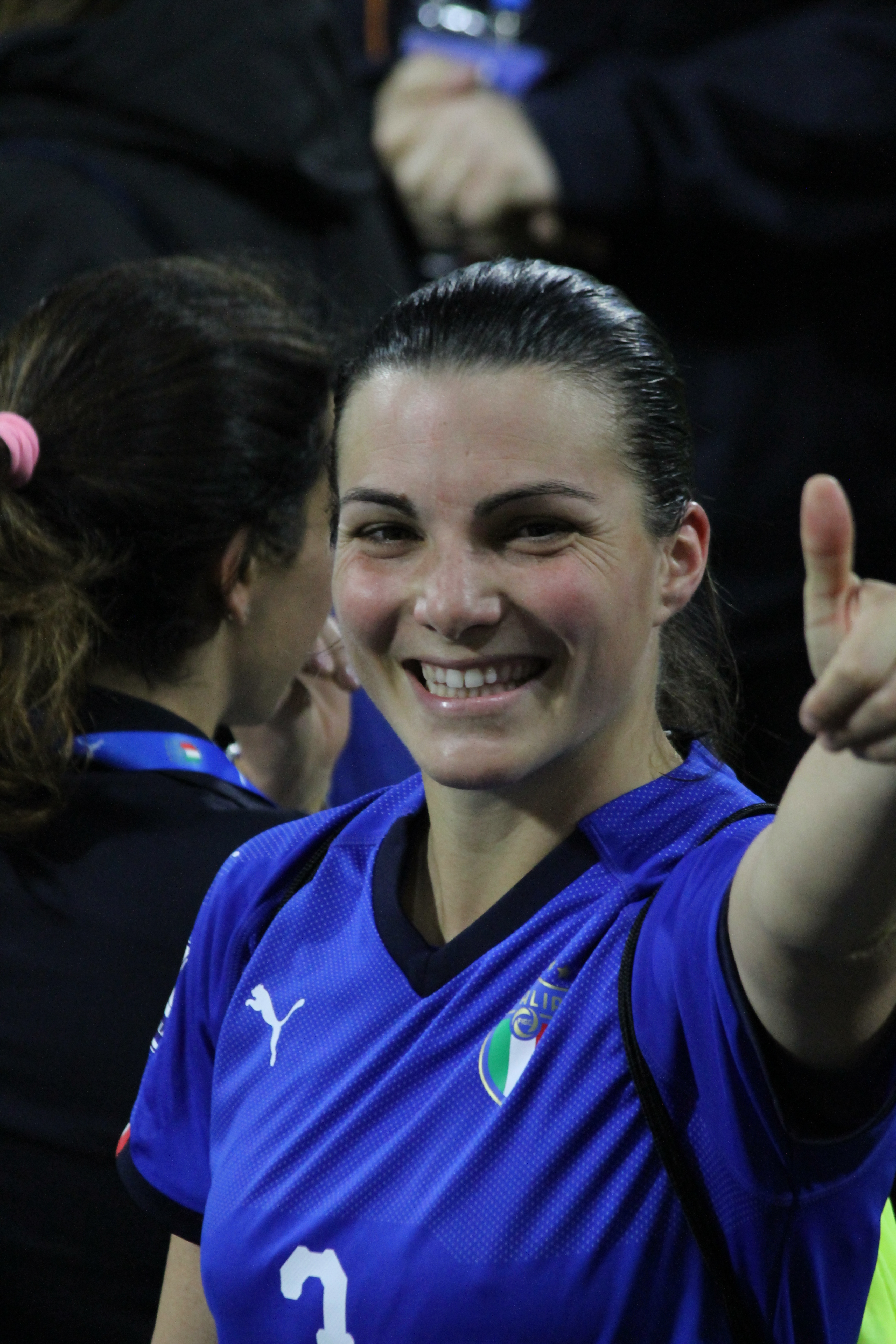 Alia Guagni, nazionale di calcio femminile dell'Italia, a fine incontro Italia-Belgio del 10 aprile 2018 allo stadio Mazza di Ferrara.